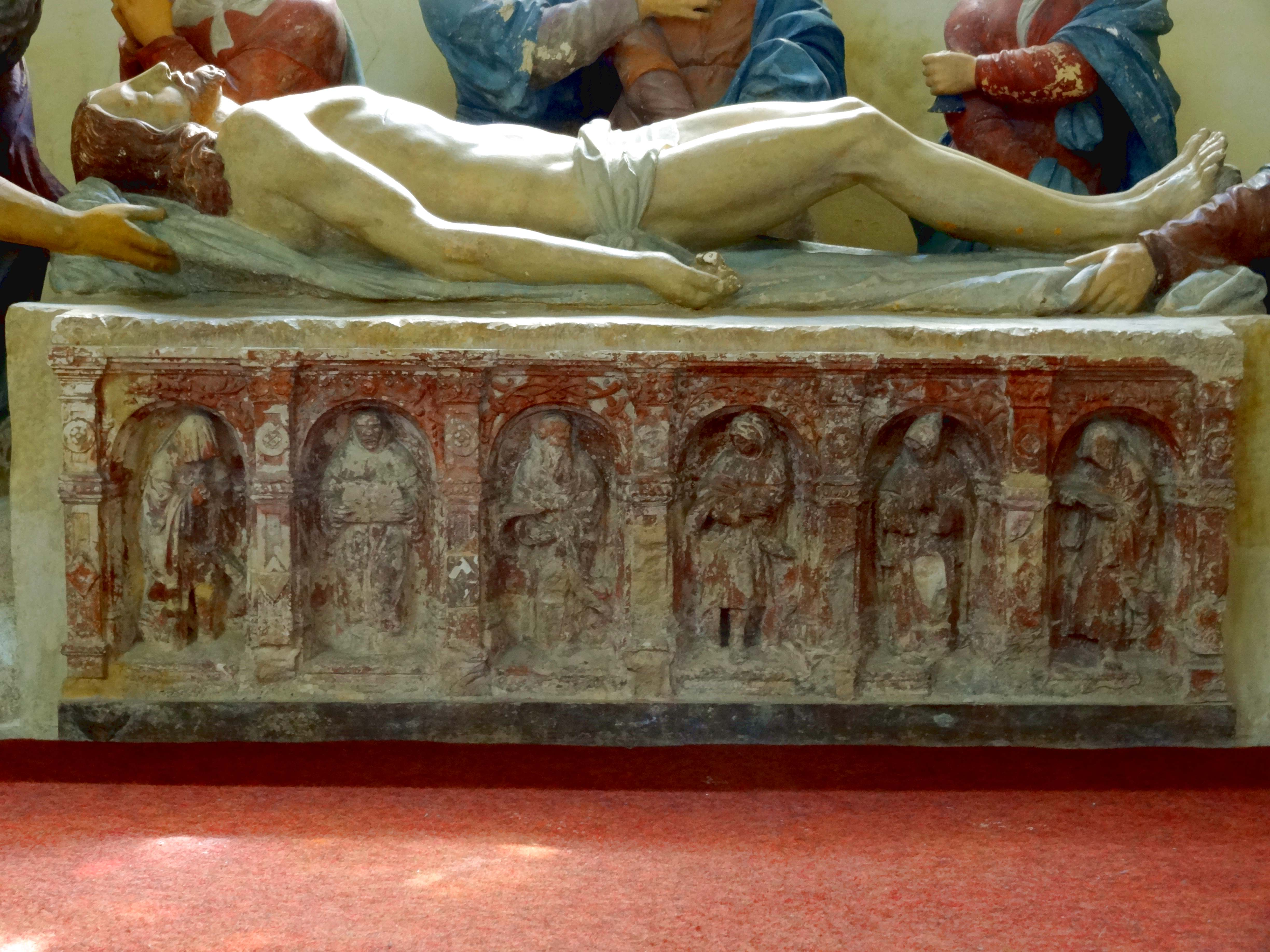 Mise au tombeau - voir titre.